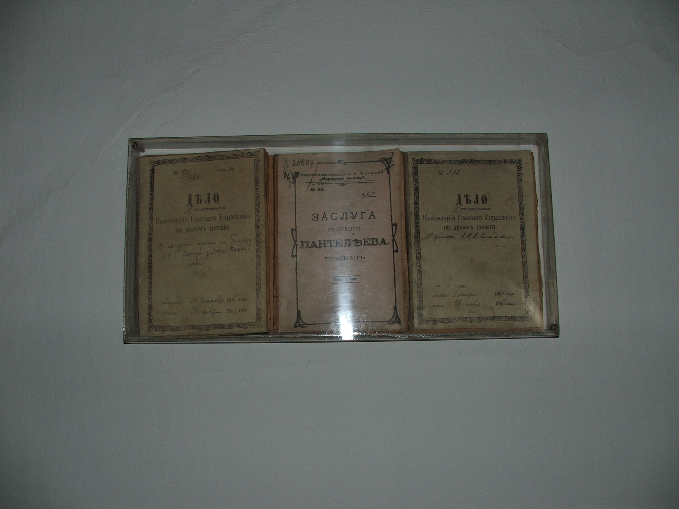 Будинок-музей О. С. Гріна, Феодосія, вул. Галерейна, 8–10, літ. А, А1, Б